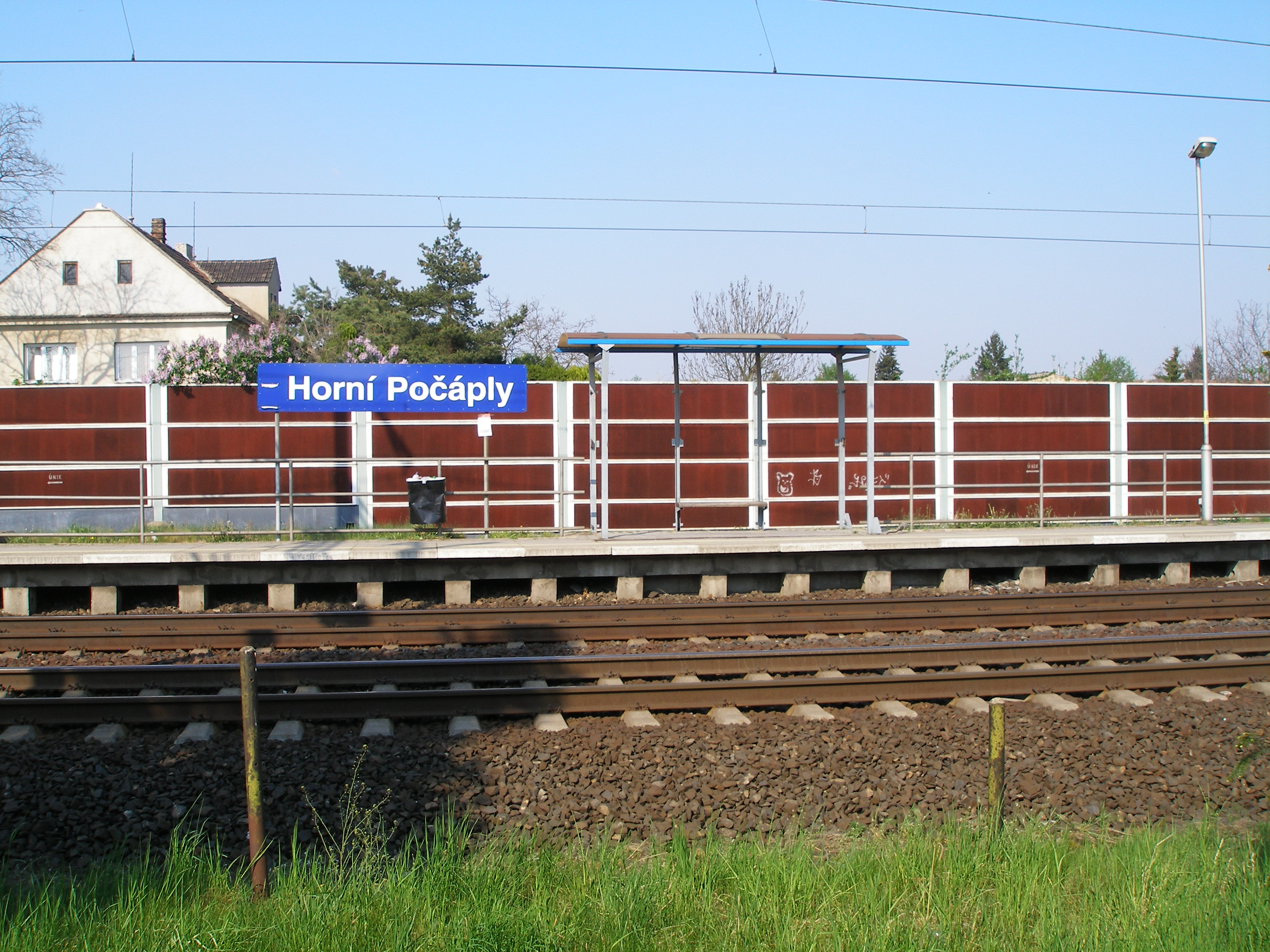 Železniční zastávka v Horních Počaplech.Unknown